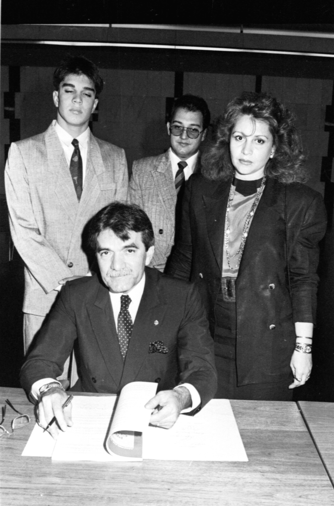 Assinatura da Constituição em 29/09/1988. Participantes - Senador Odarcir Soares acompanhado da esposa e filho. Foto: Célio Azevedo